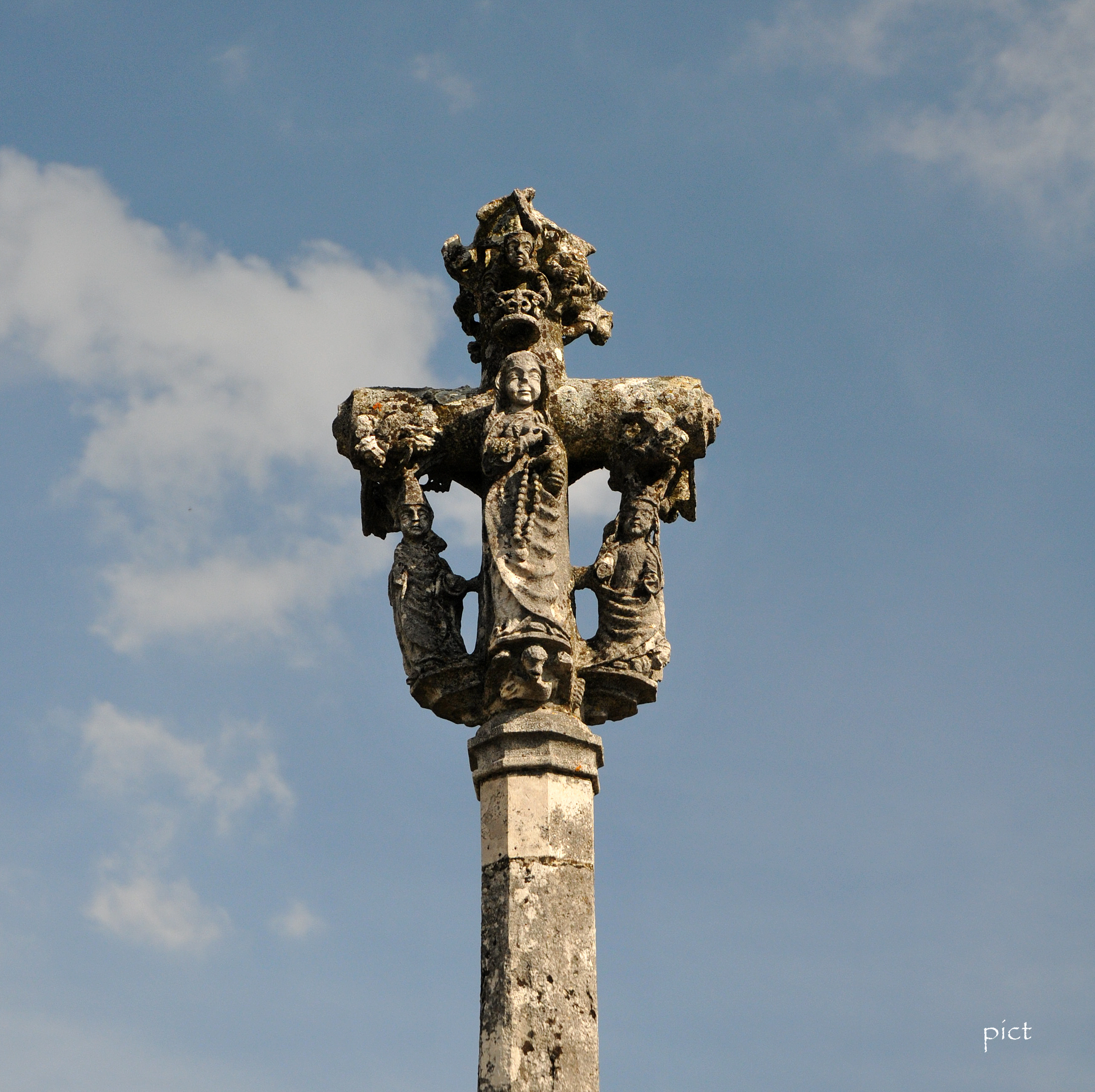 Calvaire de Dingier (hameau de Salavre) dans l'Ain. Calvaire du 15ème siècle